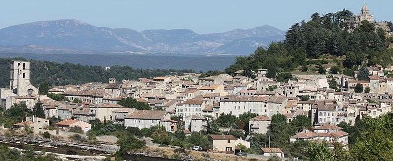 Vue de Forcalquier